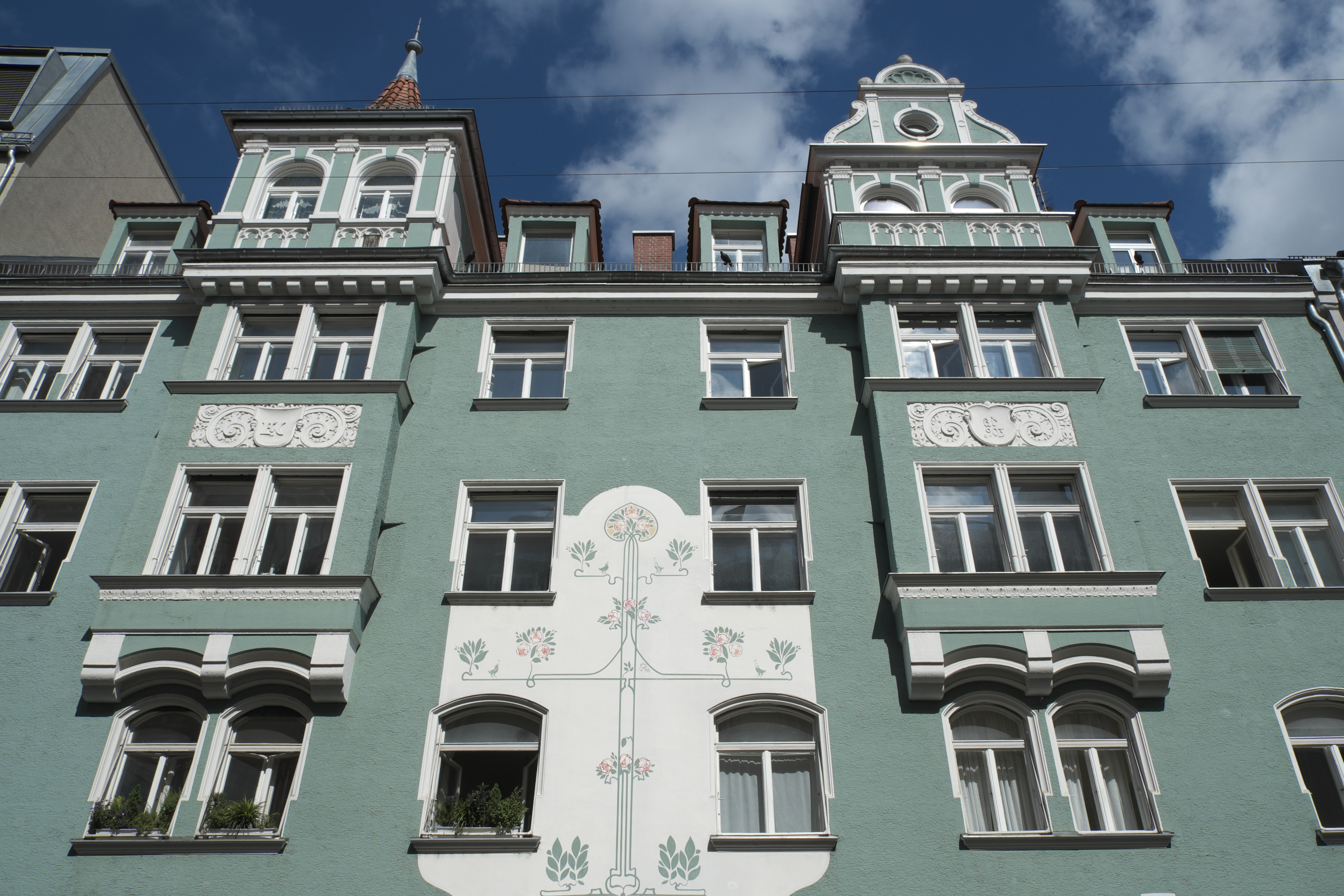 Mietshaus in der Liebherrstraße 20 im Lehel im Stadtbezirk Altstadt-Lehel in München (Bayern/Deutschland), 1903 von Heinrich Volbehr gebaut